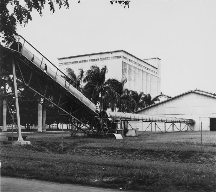 Negatief. Transport van rijstzakken van het magazijn naar de riviersteiger te Wageningen